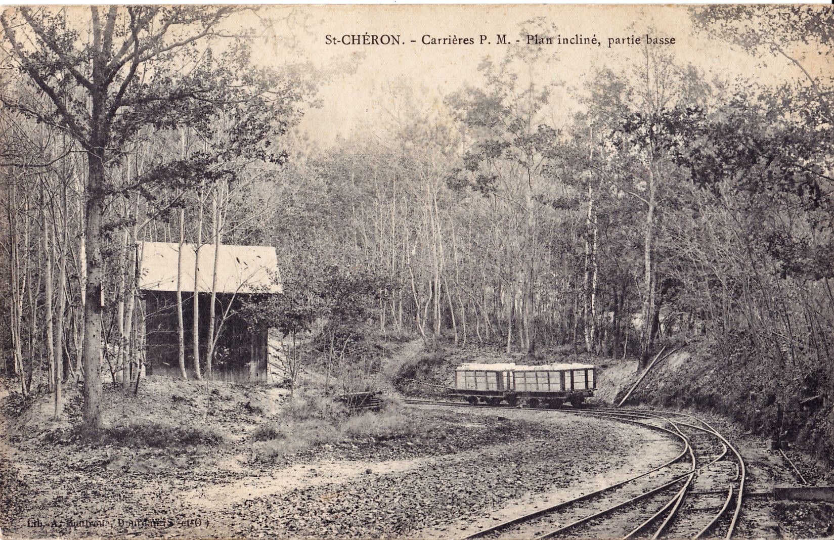 Carte postale ancienne sans mention lisible d'éditeur : SAINT-CHEROND - Carrières P.M. - Plan incliné, partie basse